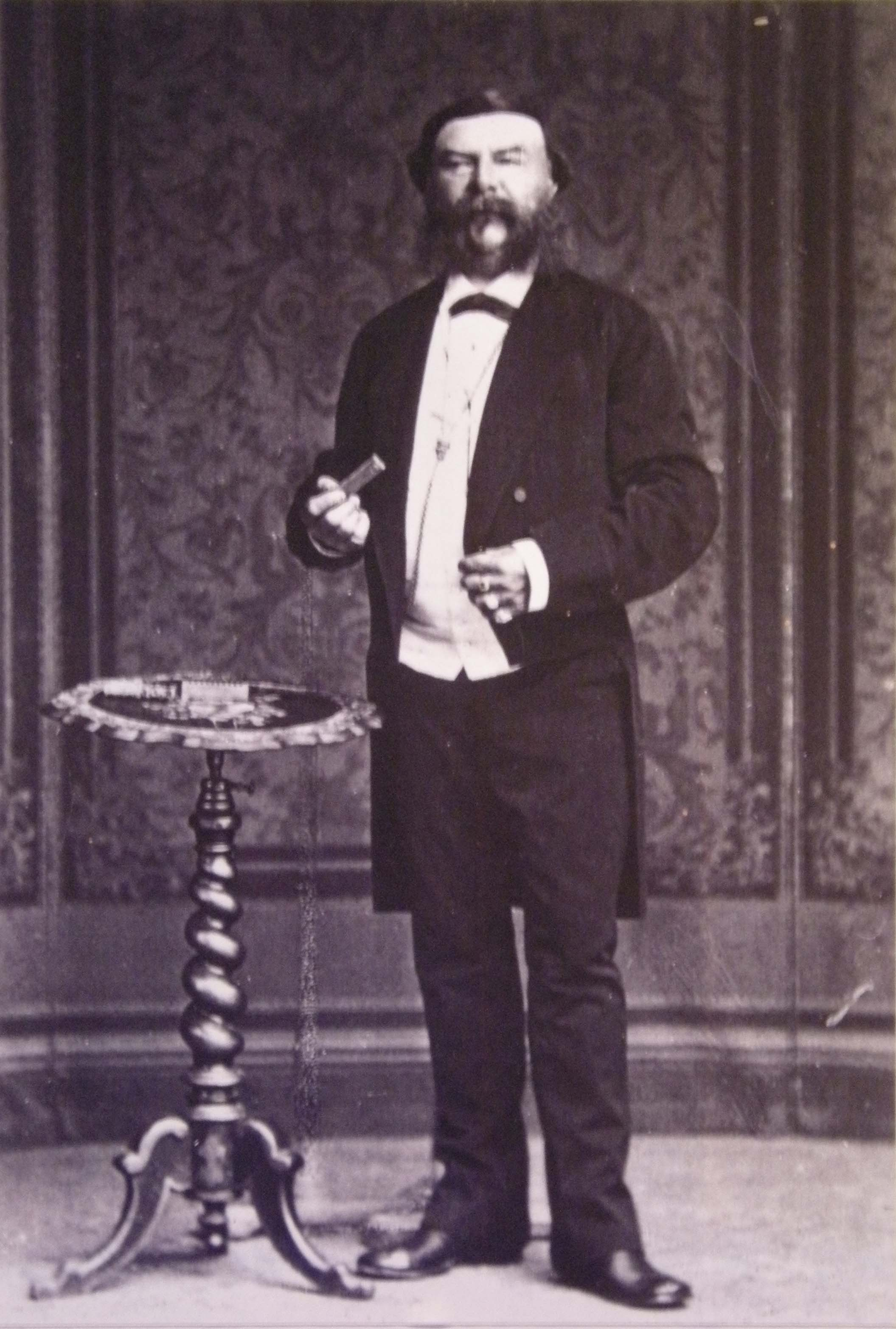 Famous Austrian illusionist Anton Kratky-Baschik (1810-1889).